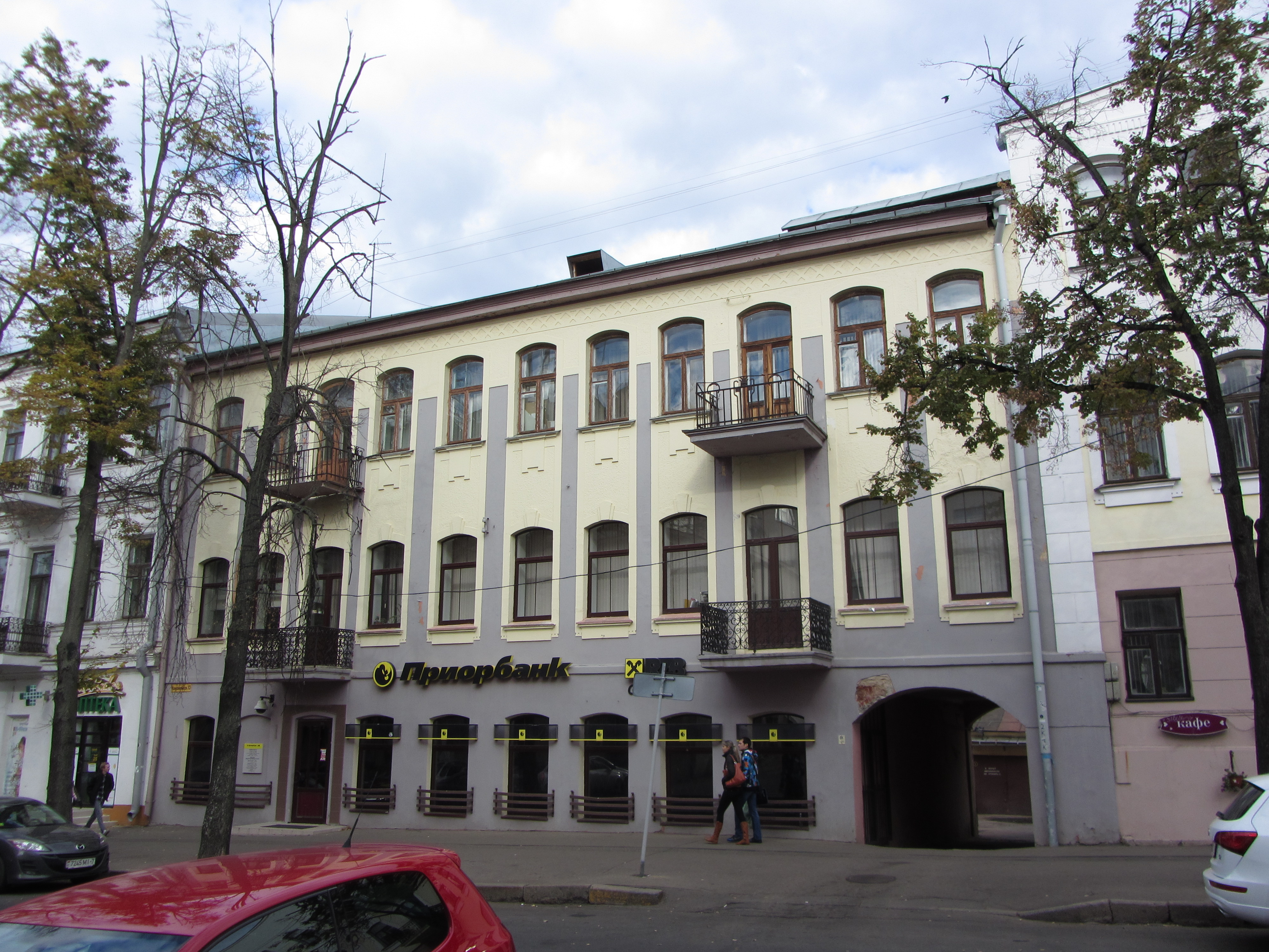 Беларуская (тарашкевіца): Камсамольская 13, Менск